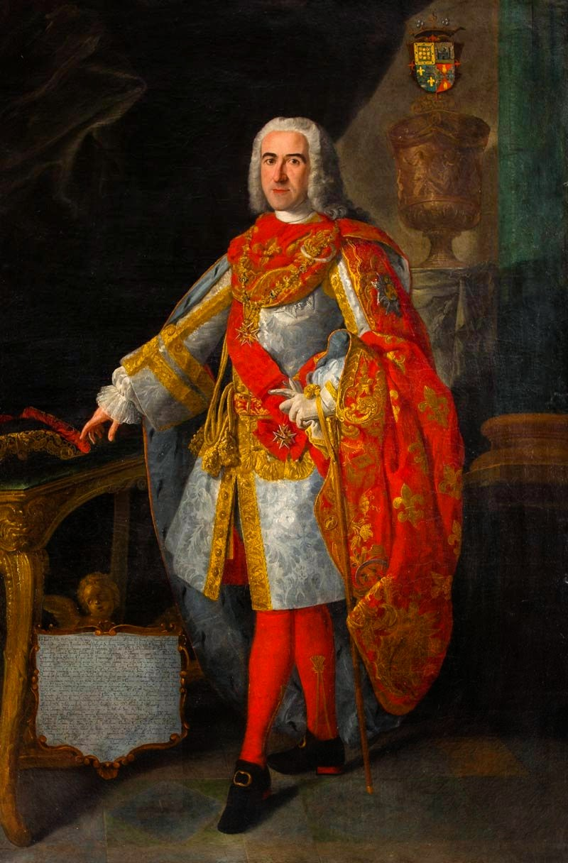 Retrato de D. Diego de Madariaga Zea, 2º Marqués de Villa-Fuerte, Caballero de la Real Orden de San Genaro,gentilhombre de cámara con ejercicio del rey Carlos III, Teniente General de sus ejércitos e inspector general de su infantería. Participó en el sitio de Velletri en 1744 y en la guerra de Portugal en 1762.